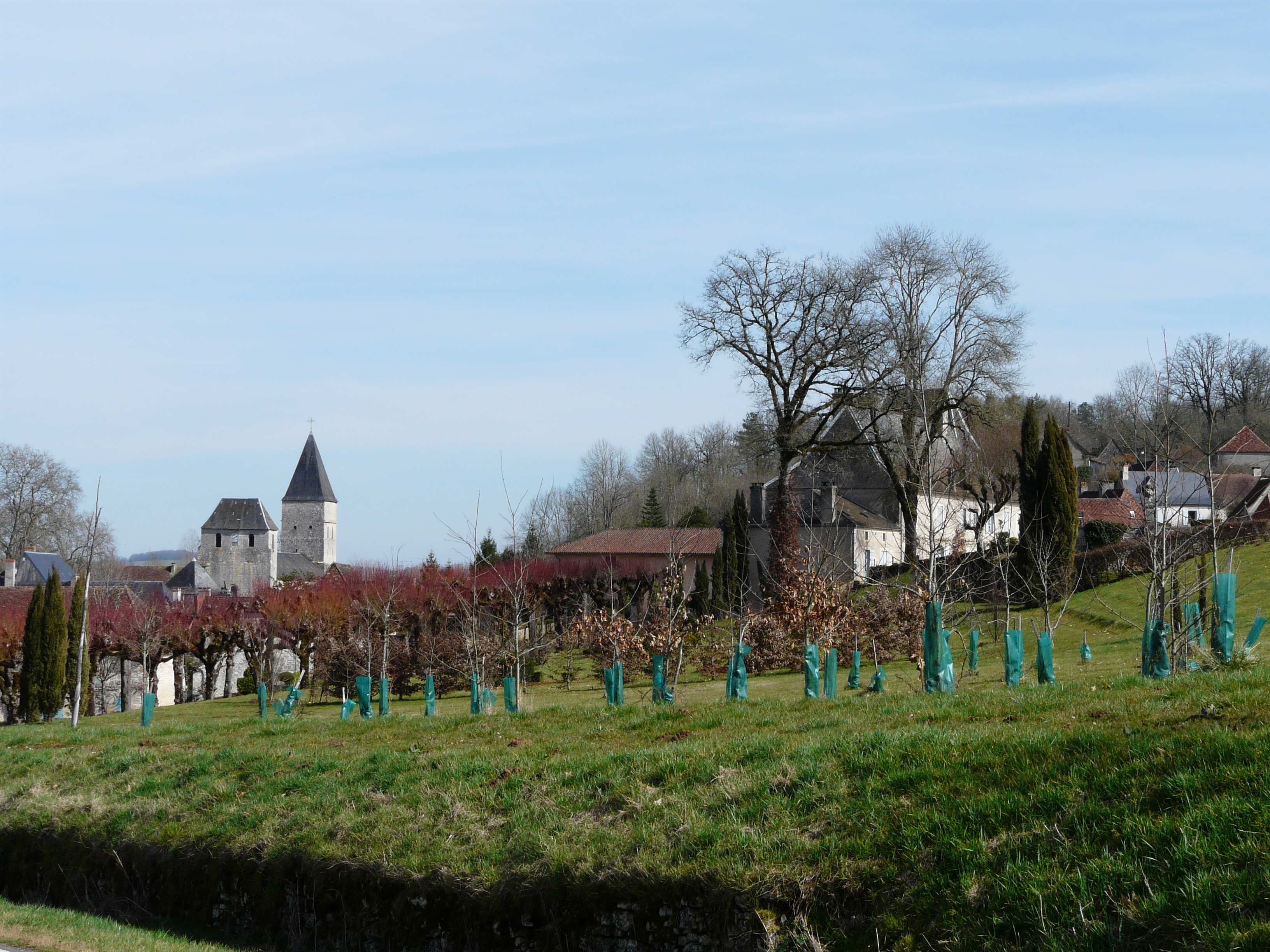 Le bourg de Tourtoirac et les deux clochers de son abbaye, Dordogne, France